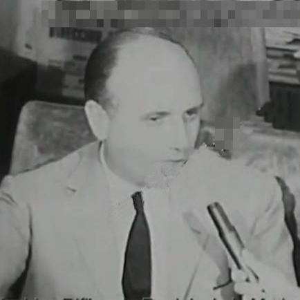 Conrado Bauer cuando era minsitro de Onganía.